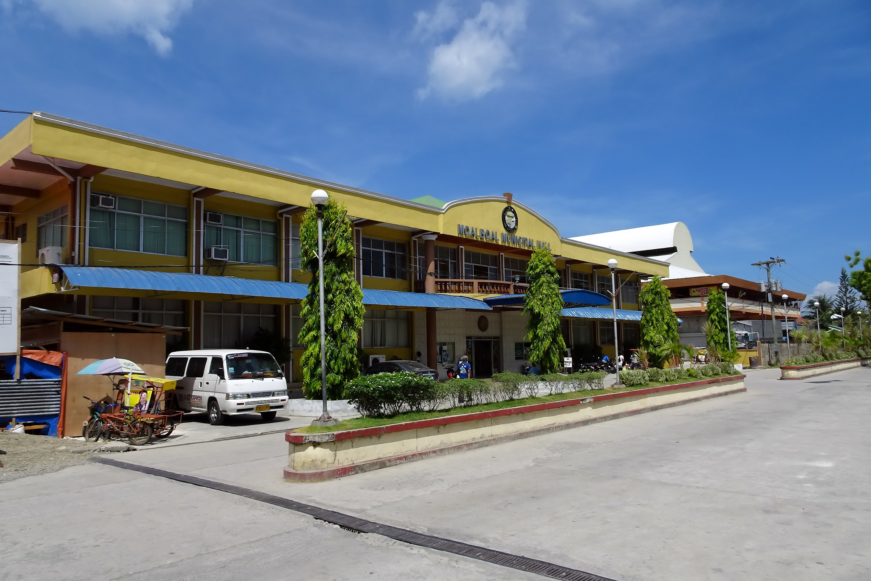 Moalboal, Cebu, Philippines